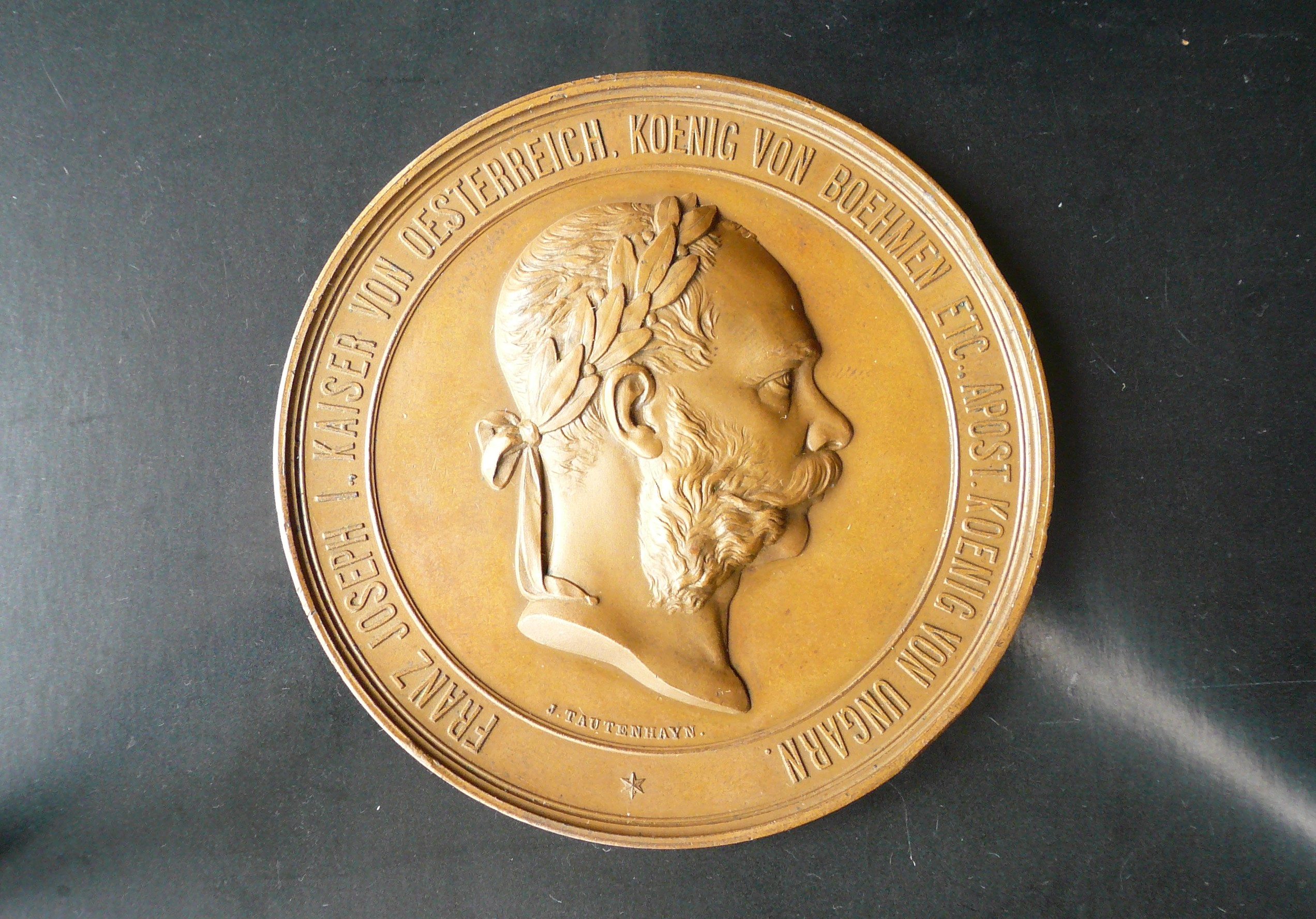 Côté face de la médaille frappée à Vienne lors de l'exposition universelle de 1873 (2e essai éclairage)